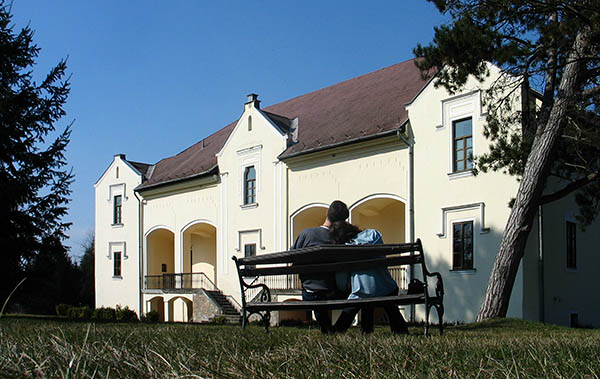 A kékedi Melczer-kastély parkja (Borsod-Abaúj-Zemplén megye, Magyarország)